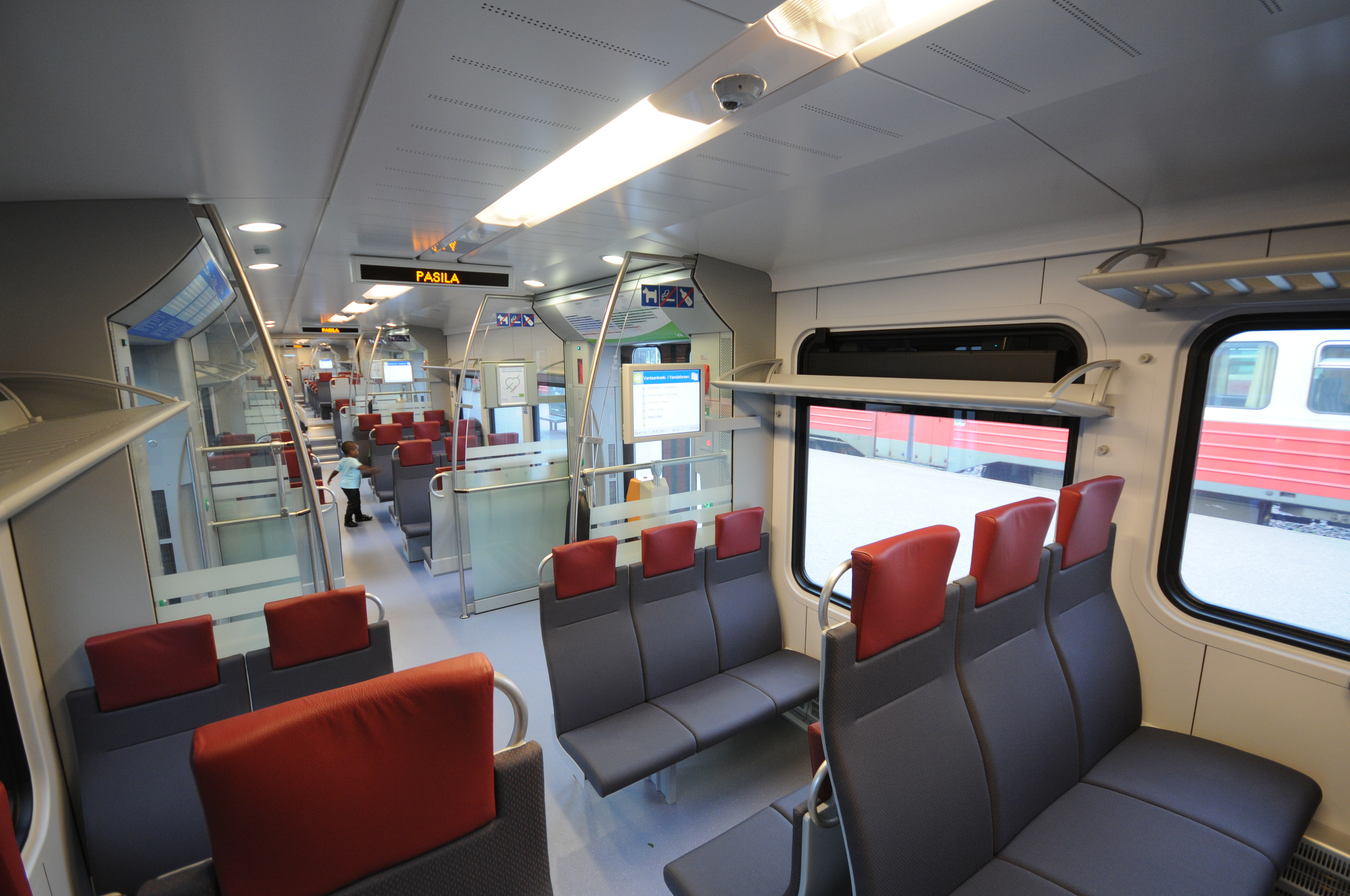 Helsiki Hauptbahnhof; JKOY Class Sm5